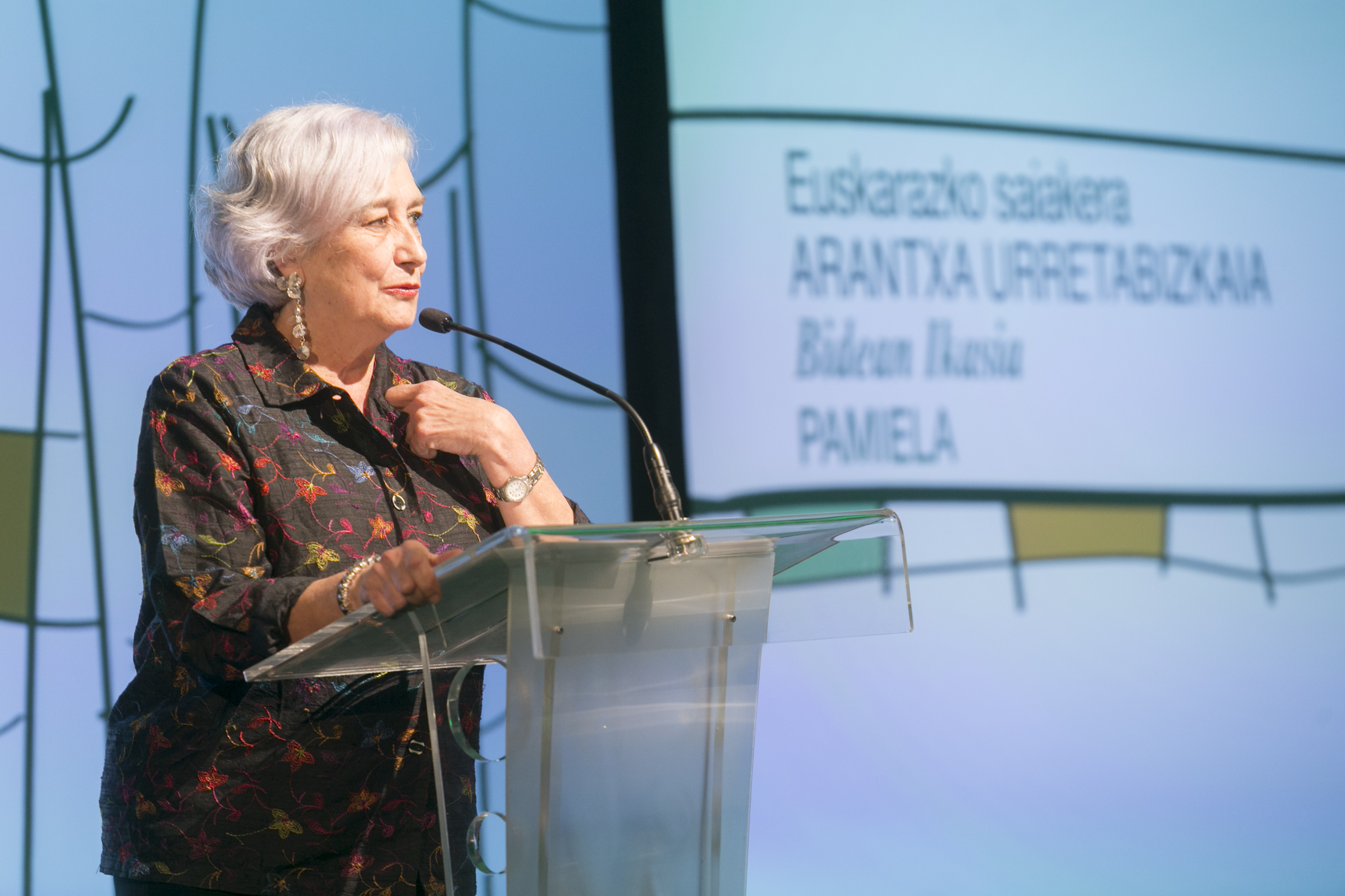 El Lehendakari Iñigo Urkullu ha presidido hoy la gala de entrega de los Premios Euskadi de Literatura, un acto que ha tenido lugar en Azkuna Zentroa de Bilbao y en el que, por parte del Gobierno Vasco, ha participado también el consejero de Cultura y Política Lingüística, Bingen Zupiria. Al acto han asistido los siete premiados de la presente edición: Asier Serrano, en la modalidad de Literatura en Euskera; Fernando Aramburu, en la de Literatura en Castellano; Arantxa Urretabizkaia, Ensayo en Euskera; Ander Izagirre, Ensayo en Castellano; Leire Bilbao, Literatura Infantil y Juvenil; Mikel Valverde, en la modalidad de Ilustración de Obra Literaria; y, por último, Matías Múgica, Traducción de Obra Literaria en Euskera.